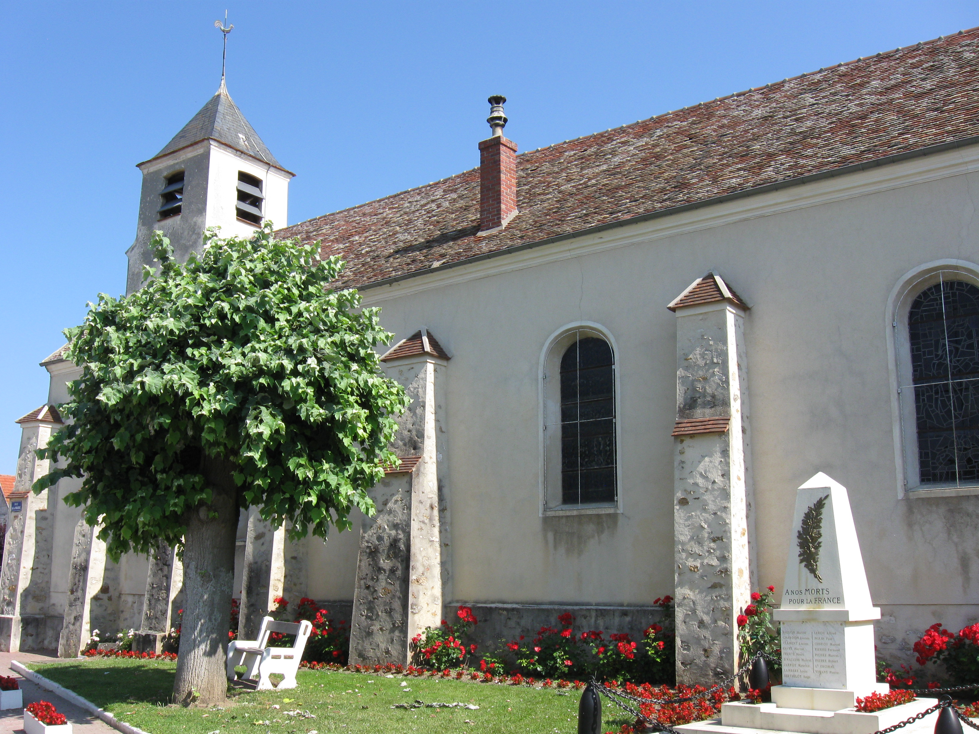 Église Sainte-Madeleine de Changis-sur-Marne. (département de la Seine-et-Marne, région Île-de-France).